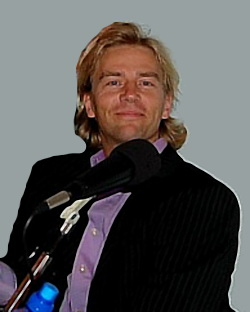 Interview voor Radio Westerwolde na optreden in Geert Teis Stadskanaal.